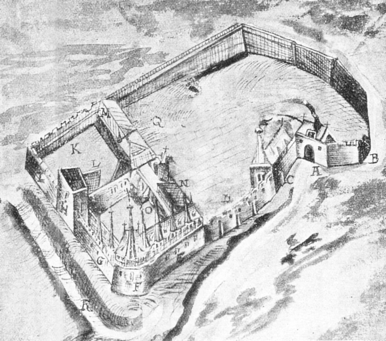 Harzburg 1574, A = Einfahrt, B, scharfe Ecke, C = Kapelle, E = Wohnhaus, F = Zwinger, G = Haus an der Harnisch Kammer, H = Alter Pulverturm, I = Mauer, K = Mauer, K = Mauer, L = Mauer, M = Altes Brauhaus, N = Amtsstube, = = Alte Küche, Q = Krodo Holl, R = Graben